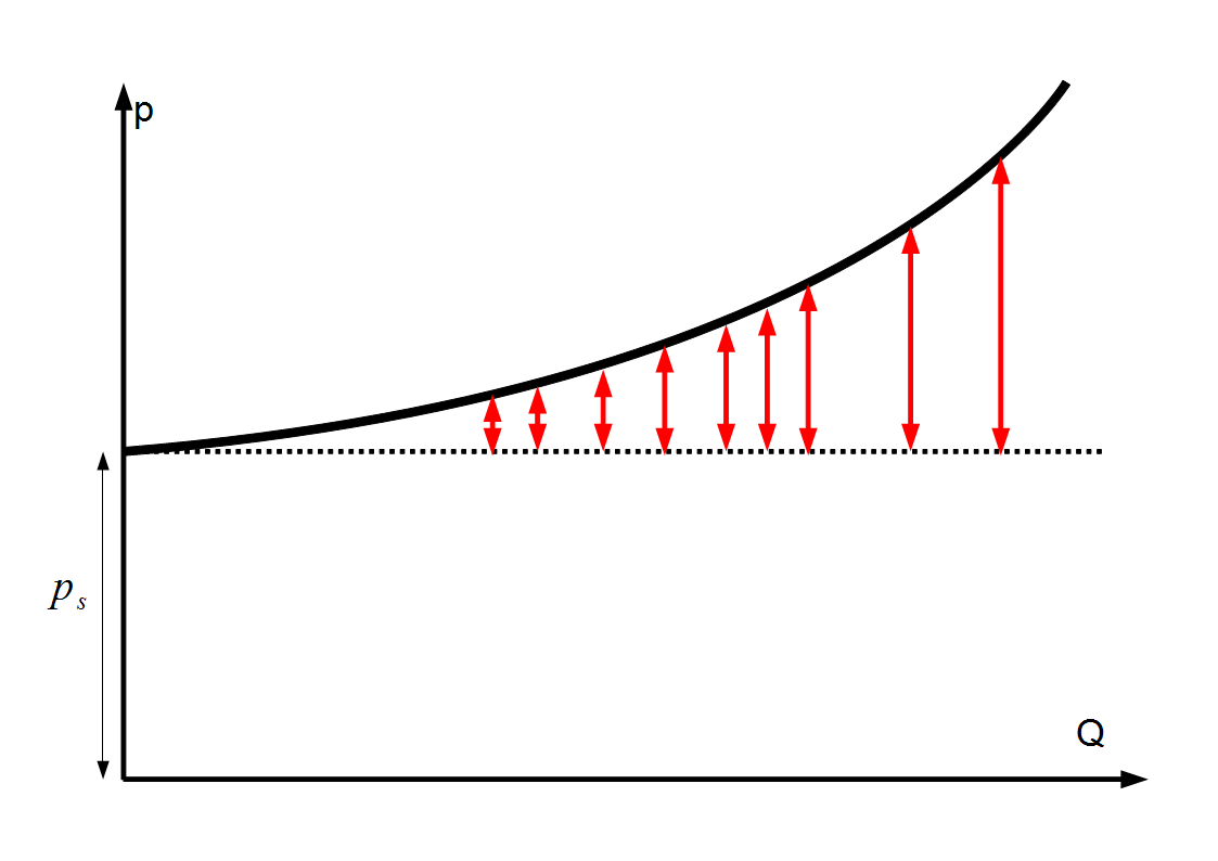 Veband: Opvoerdruk - Debiet bij een centrigugaalpomp. ps: statische opvoerdruk rood: ladingsverliezen